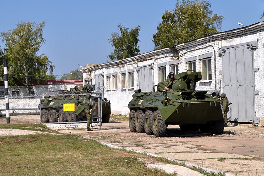 Приведение в полную степень боевой готовности 23-й отдельной гвардейской мотострелковой бригады ЦВО, задействованной во внезапной проверке боеготовности (г. Самара)